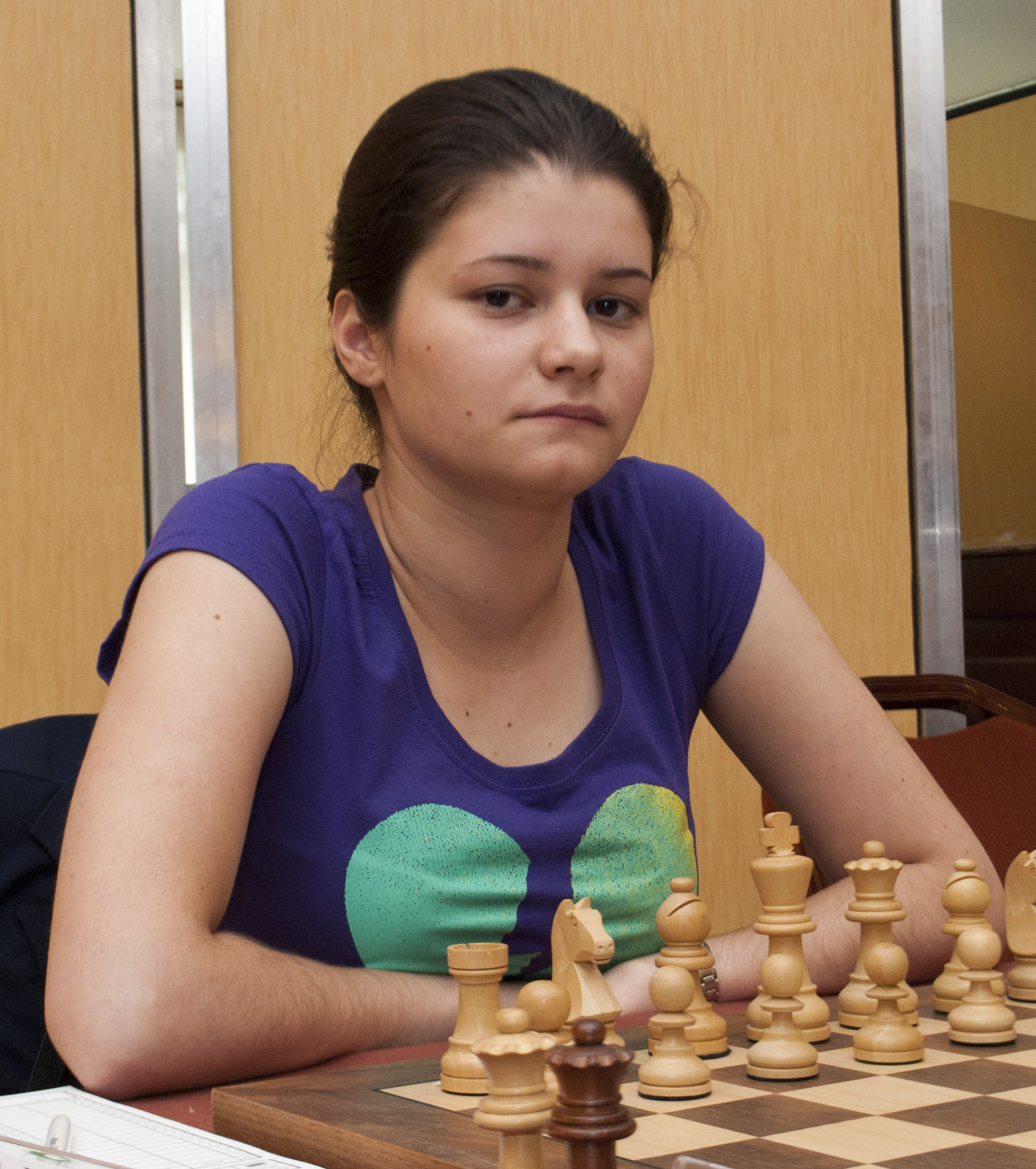 IM Bodnaruk Anastasia, WChJ Athens 2012